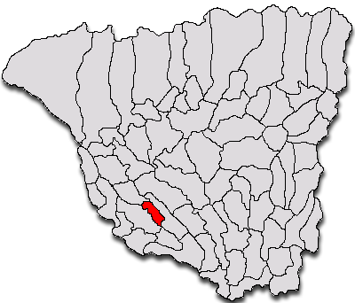 Categorie:Hărţi ale judeţului Gorj